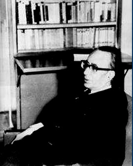 Ahmad Fardid